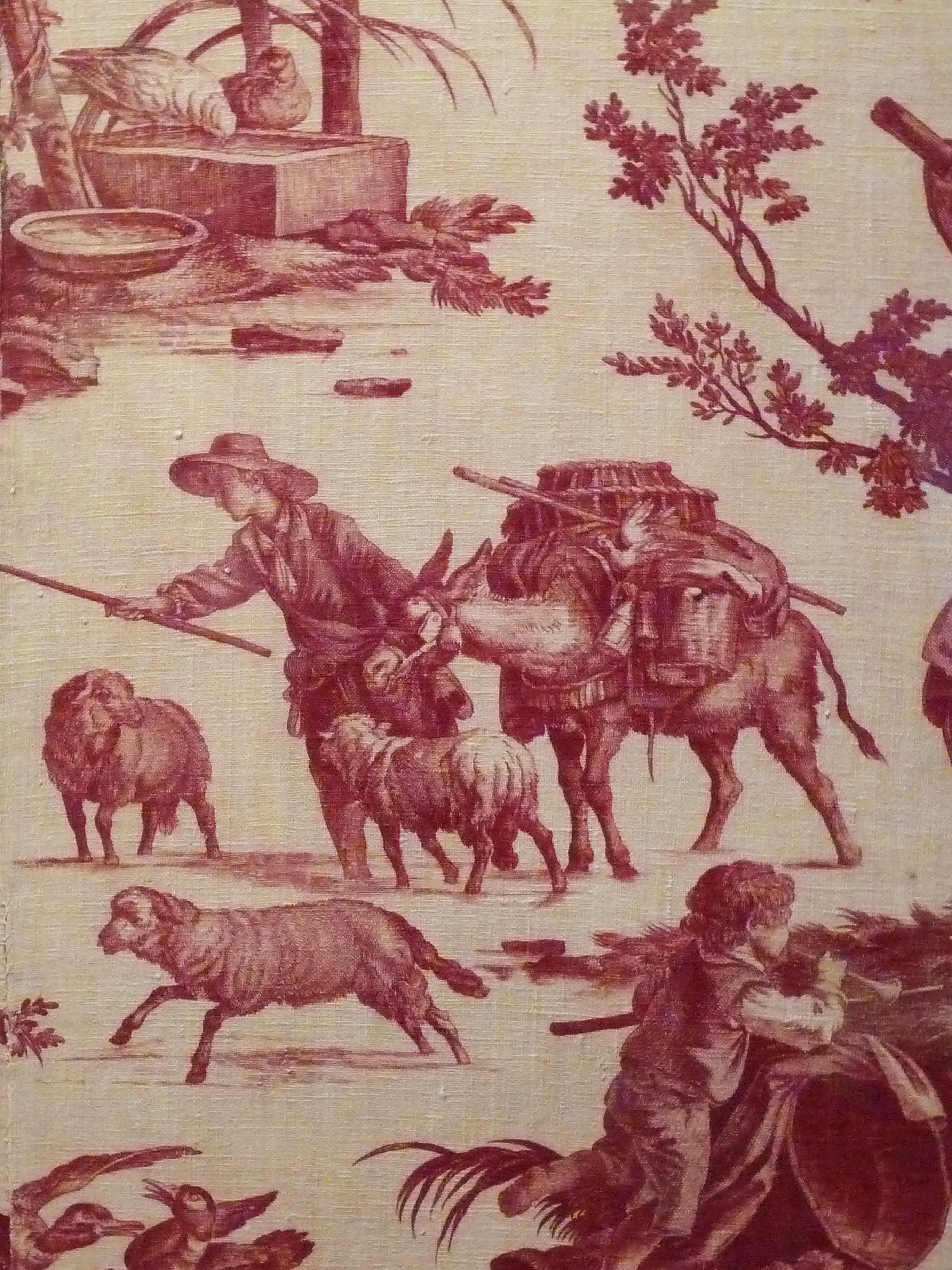 Les occupations de la ferme, Jouy-en-Josas, manufacture Oberkampf, dessinateur Jean-Baptiste Huet, vers 1785-1792, toile de coton imprimée à la plaque de cuivre